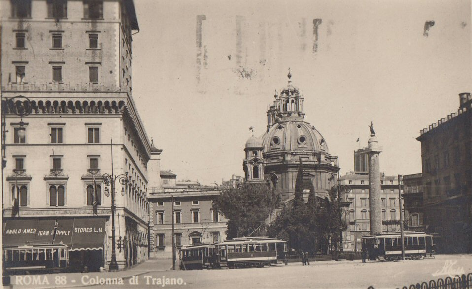 Piazza Venezia prima delle demolizioni per il Vittoriano (ante 1888). Di fronte, la Colonna traiana; sulla destra palazzo Torlonia poi demolito